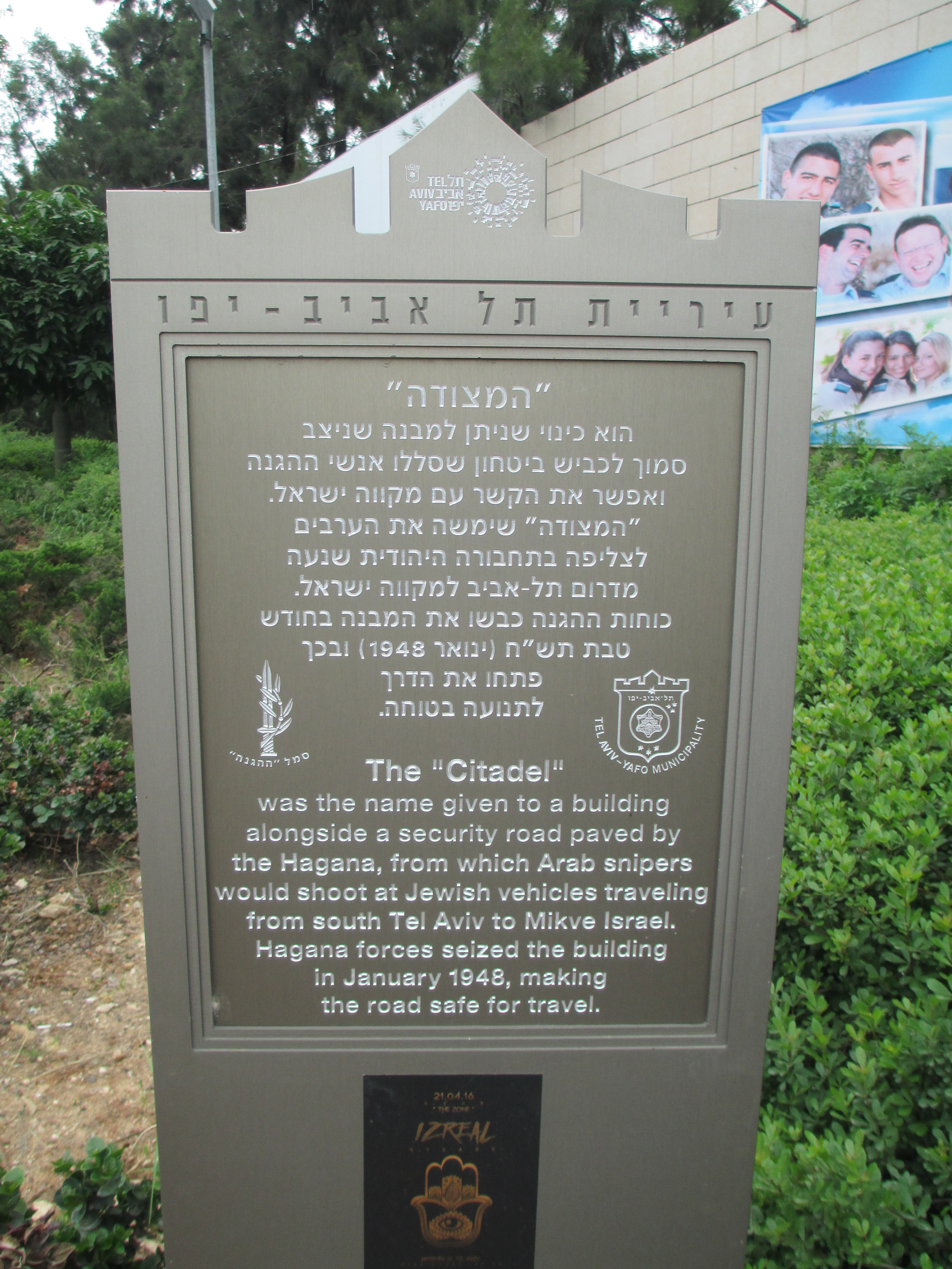 לוחית זיכרון לעמדת "המצודה" ששמרה על כביש הביטחון ב-1948. בכניסה לבית הספר "הולץ" בתל אביב